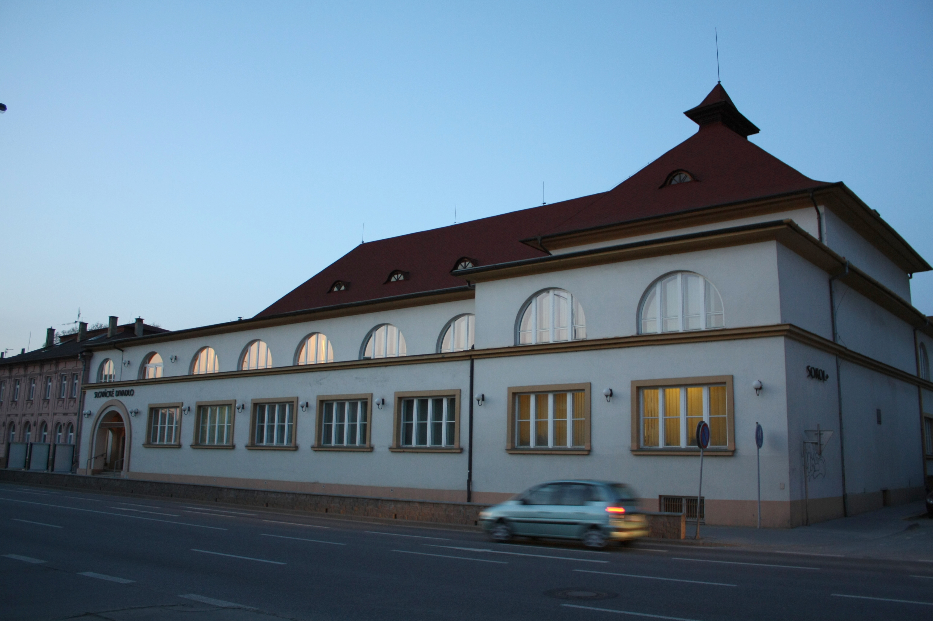 Slovácké divadlo v Uherském Hradišti, dnešní sídlo v bývalé budově sokolovny